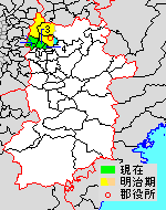 奈良県生駒郡の位置